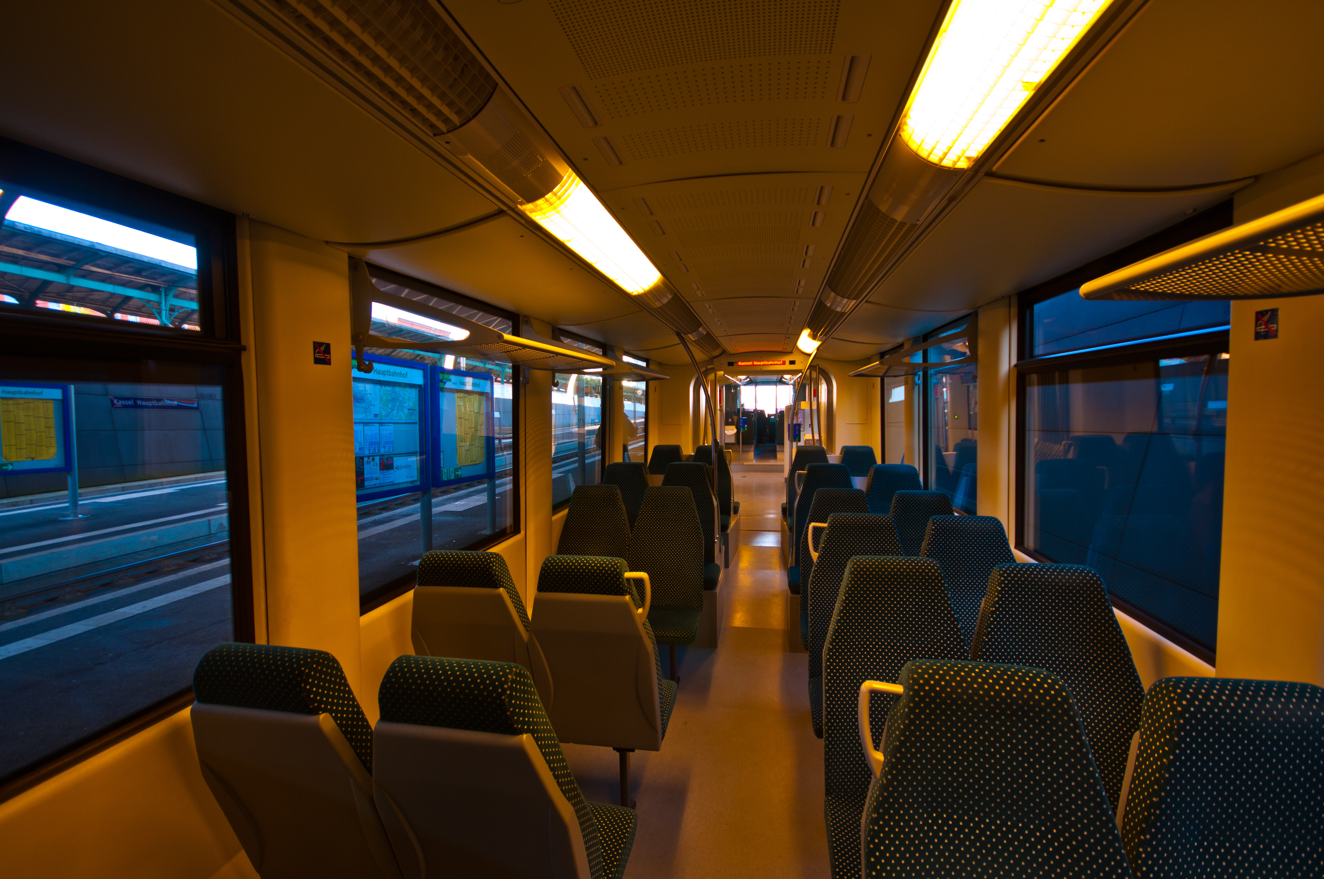 Kassel Hauptbahnhof; Regiotram